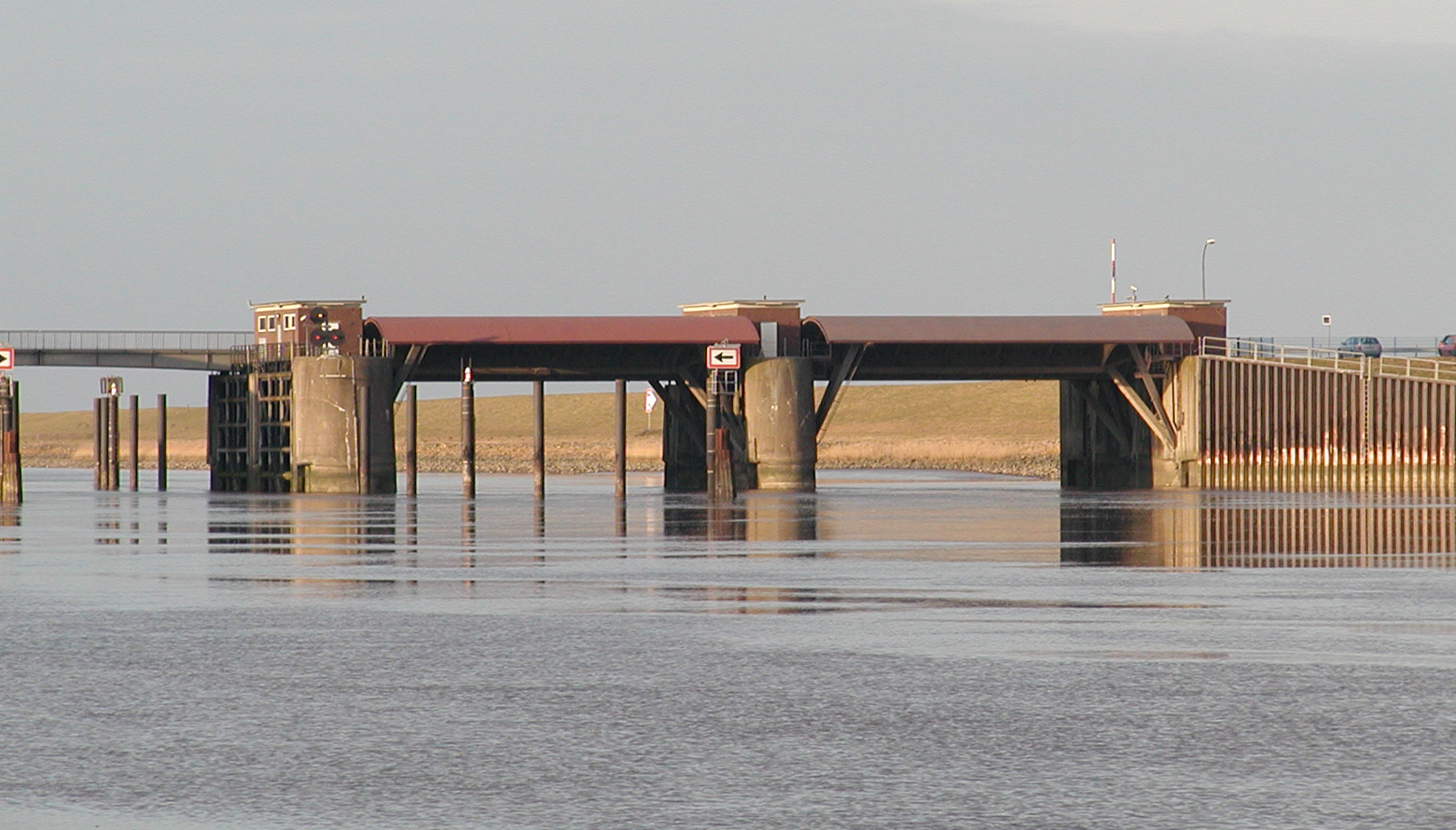 Rechts von der Durchfahrt